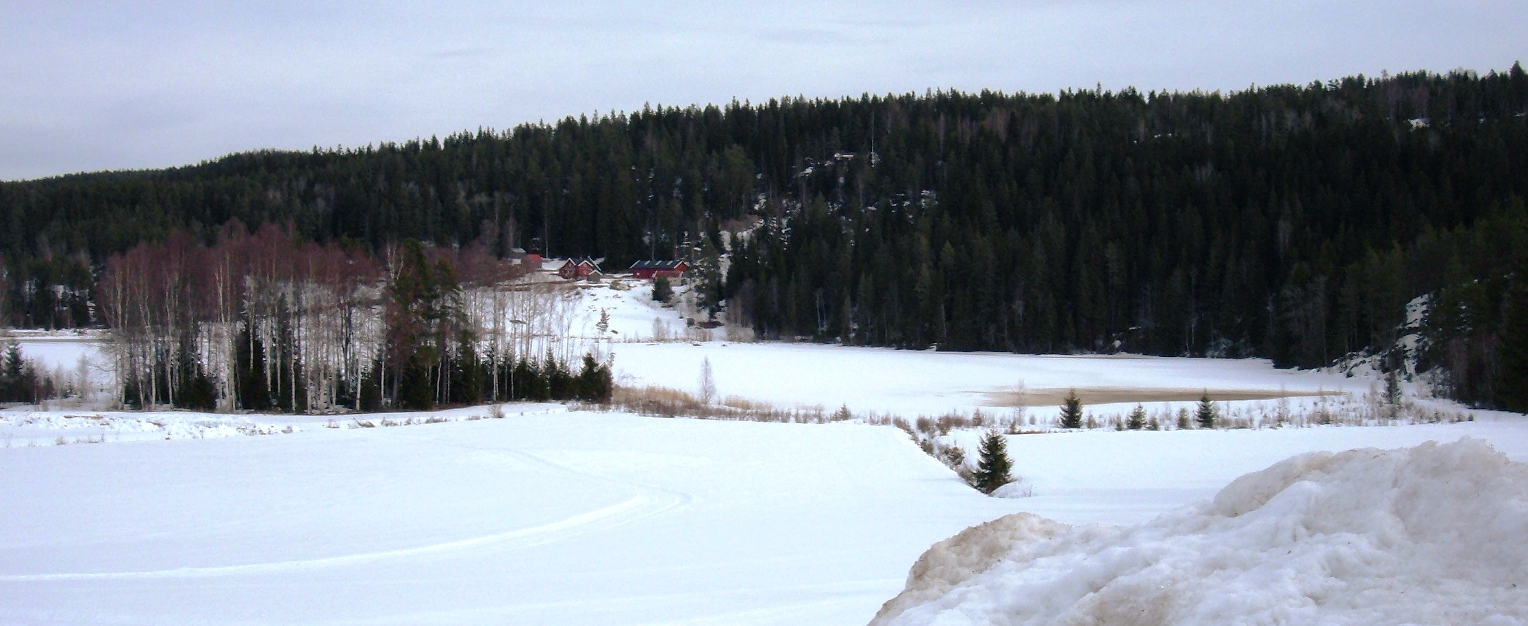 Morrtjernet ved Spillhaug på Lierfoss i Aurskog-Høland kommune, Akershus.